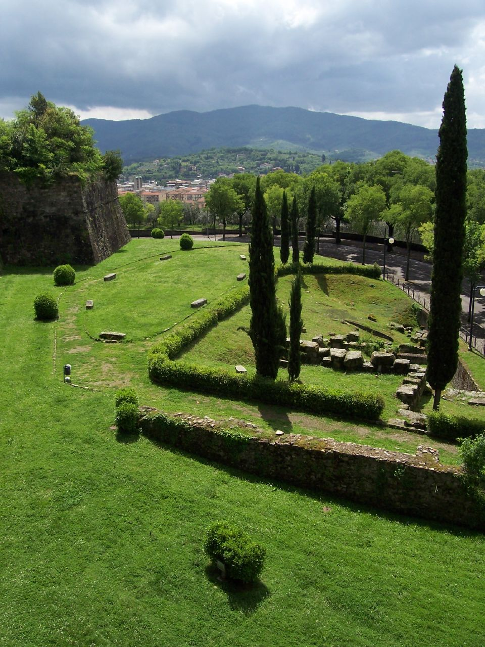 La fortezza di Arezzo, Toscana, ItaliaArezzo's Duomo